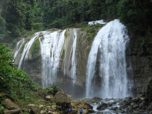 Air Terjun Maredred di Kampung Sakartemin Distrik Fakfak Timur, Kabupaten Fakfak Papua Barat Indonesia